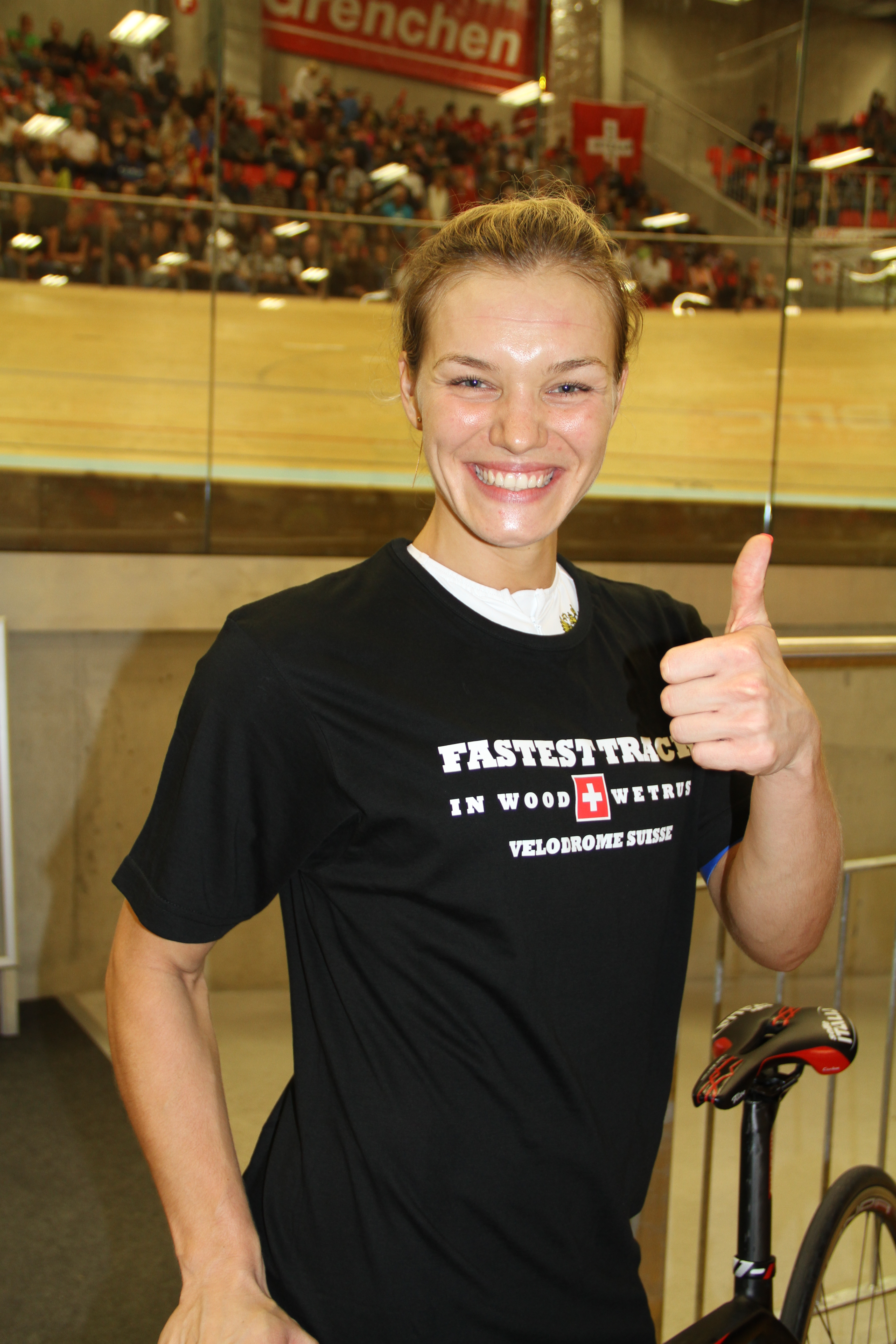 Anastasiia Voynova mit Weltrekord-T-Shirt The making of this document was supported by the Community-Budget of Wikimedia Germany.